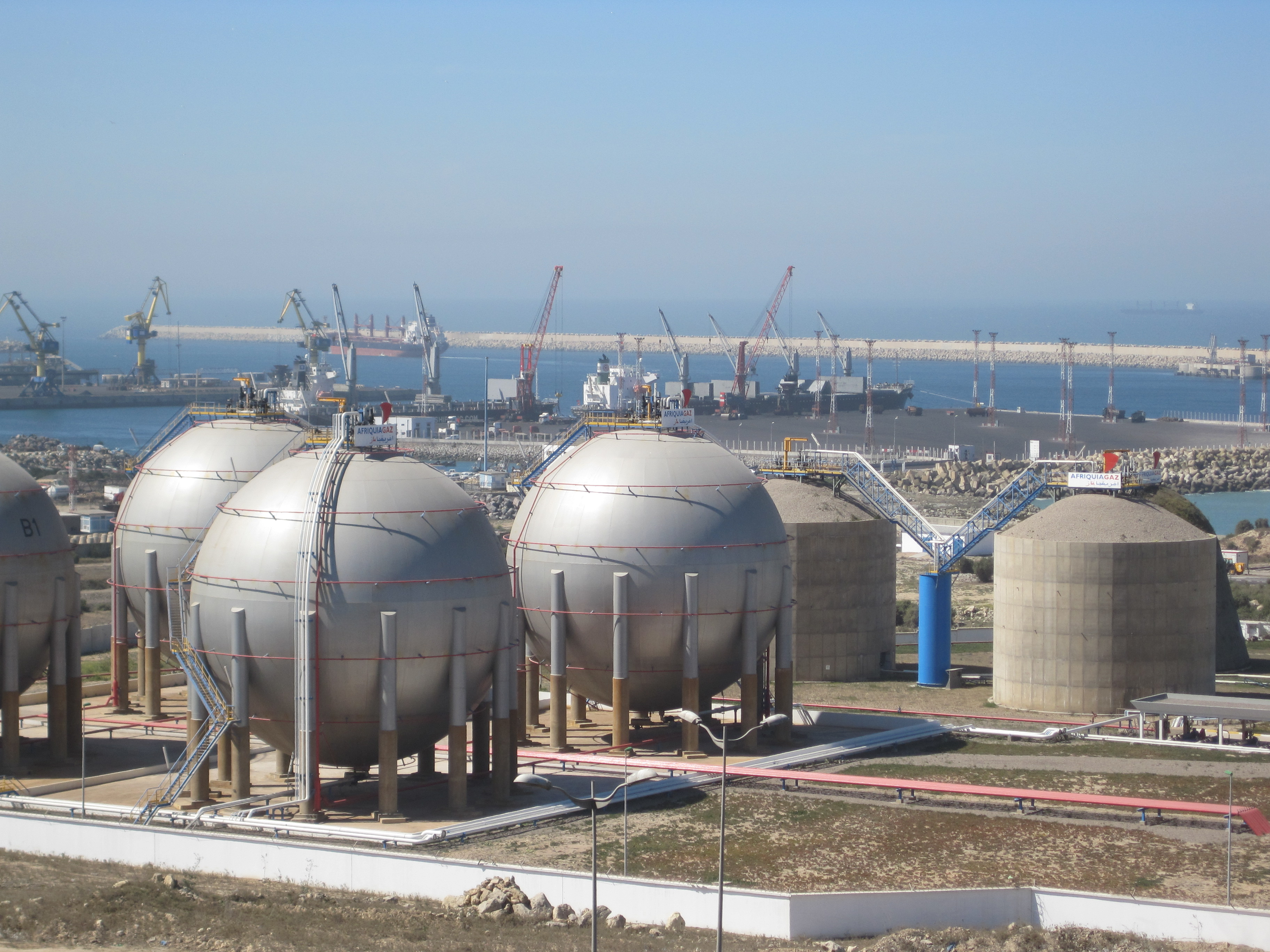 site portuaire industriel